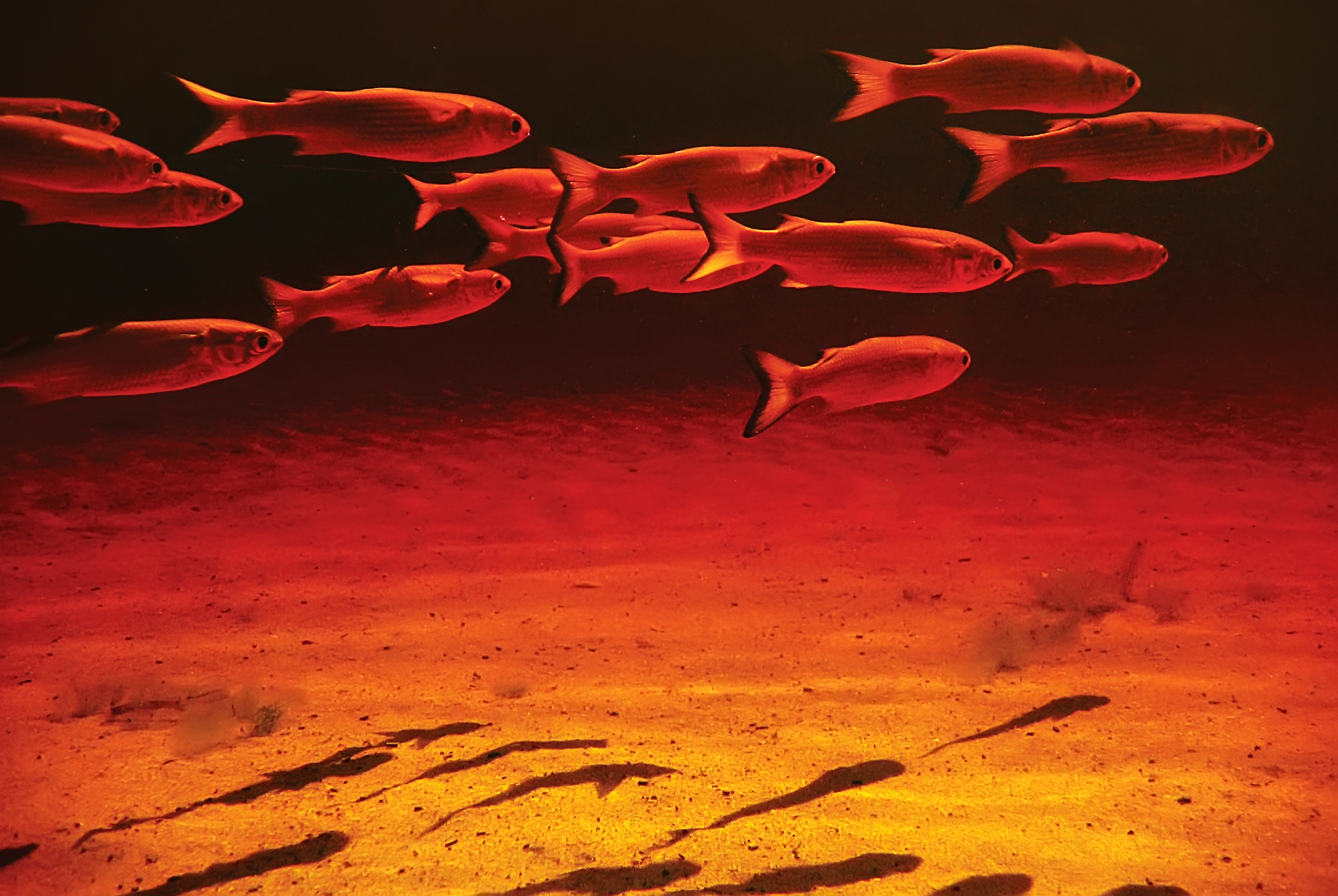 Estas são as tainhas filhotes, esperando a Lagoa de Caraís, no Parque Estadual Paulo César Vinha, se romper para poderem ir para o mar. A Lagoa de Caraís é um berçário perfeito para estes peixes poderem crescer até o momento de irem para o oceano.